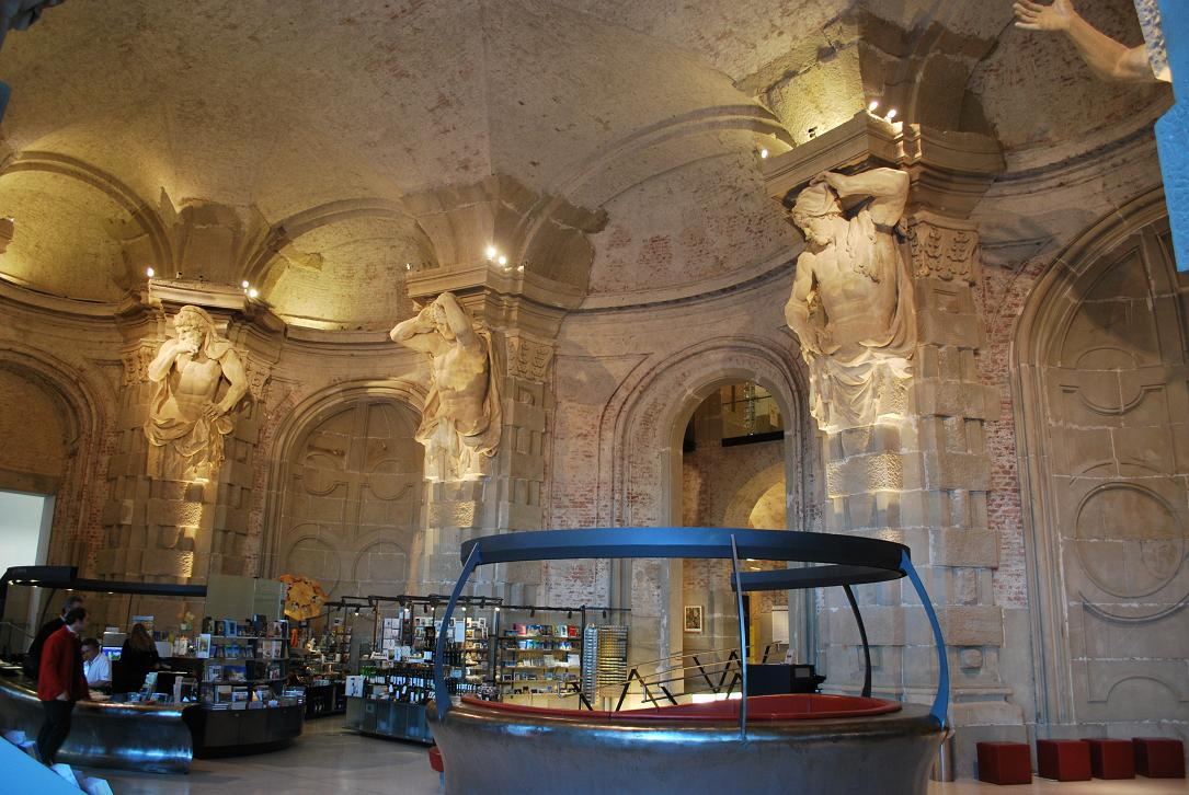 Sala terrena